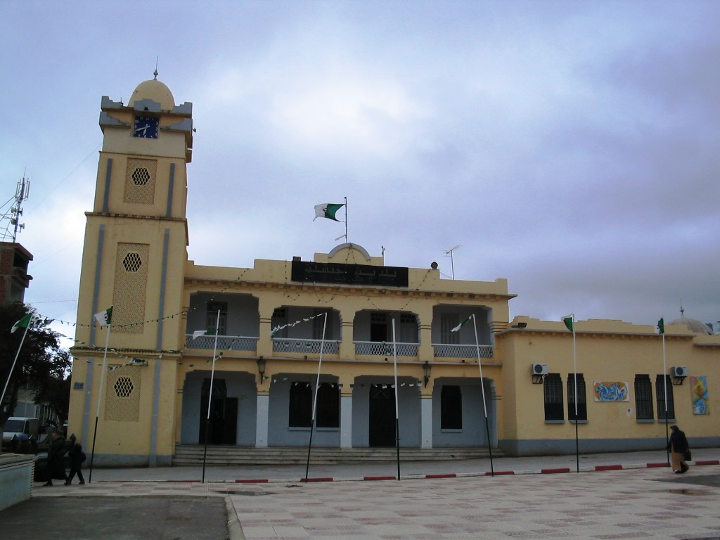 APC- KHENCHELA – ALGERIE